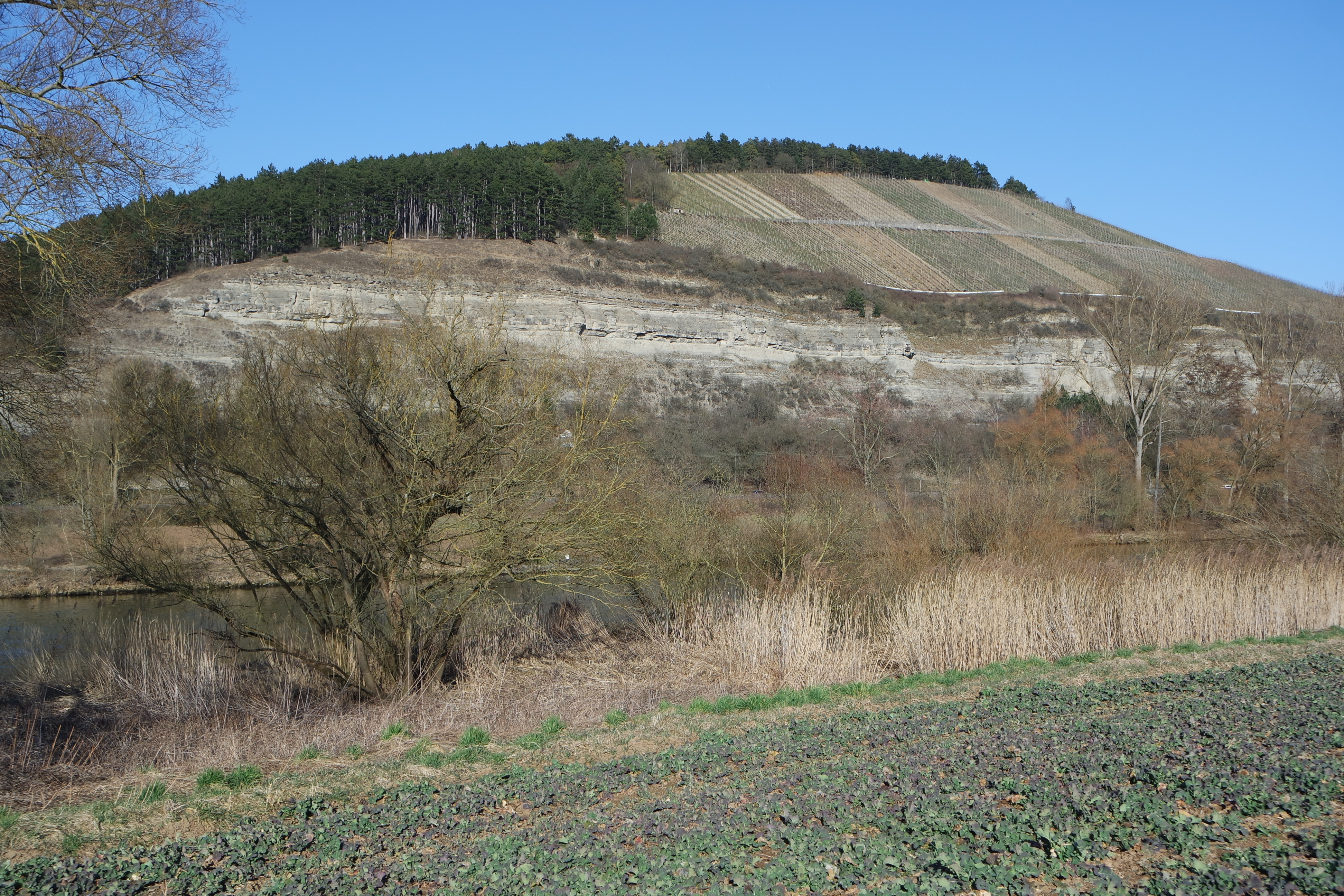 Geotop Prallhang südlich Karlstadt (Stettener Weinberge) vom Laudenbacher Mainufer